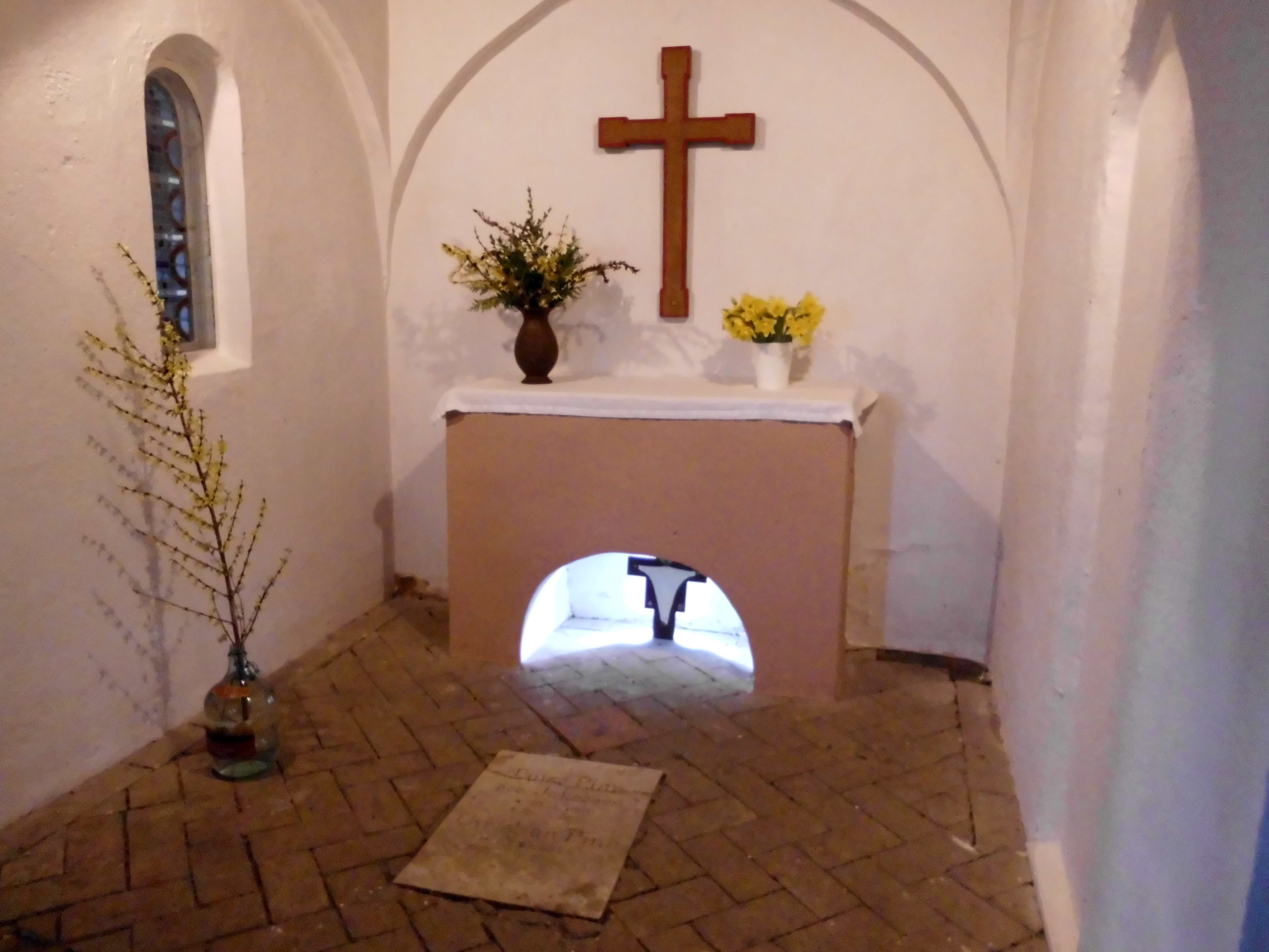 Innenraum der Waldkapelle Neuwühren.